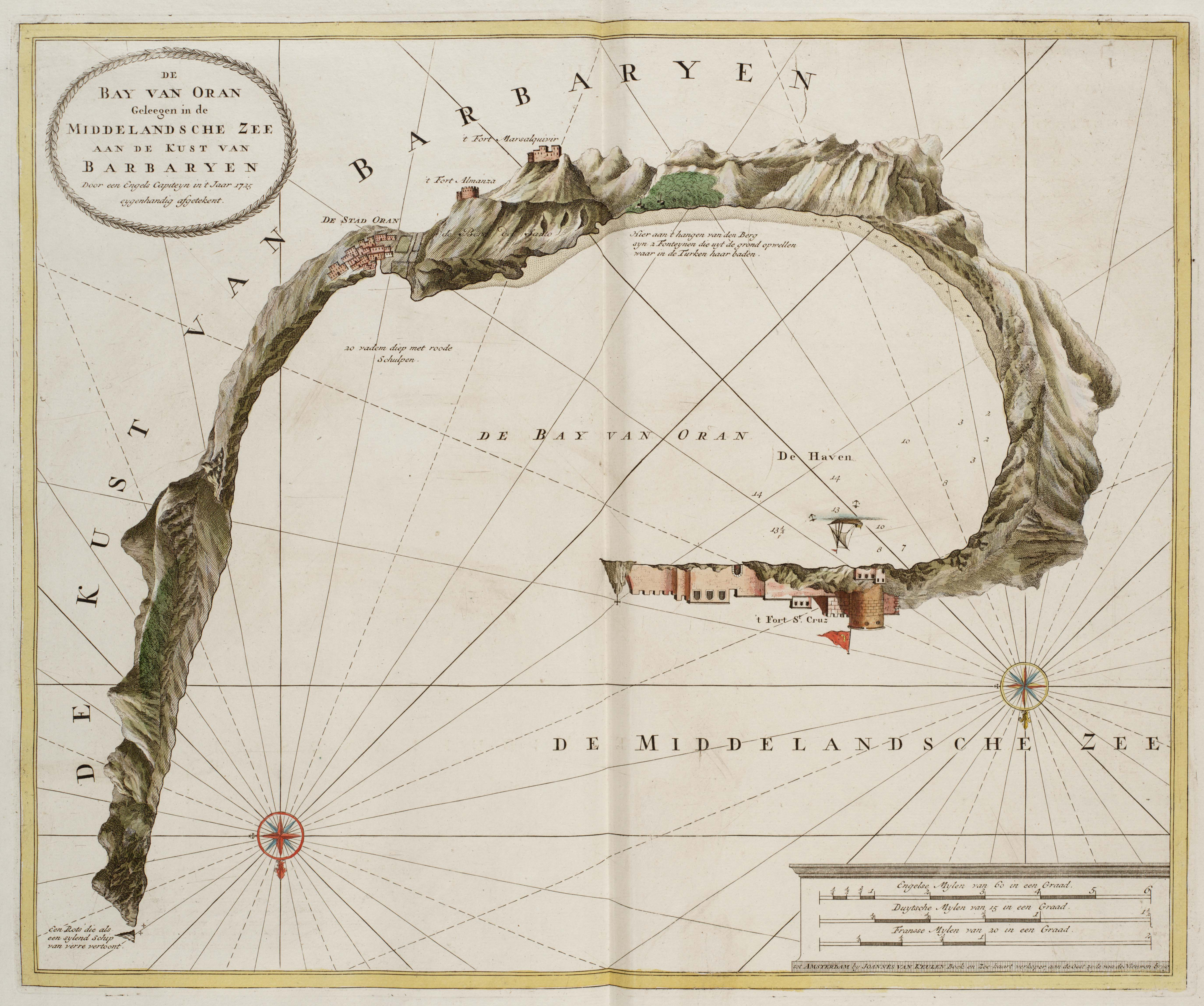 Carte de la baie d'Oran sur la côte de Barbarie d'après un cartographe hollandais de 1725. "De Bay Van Oran"